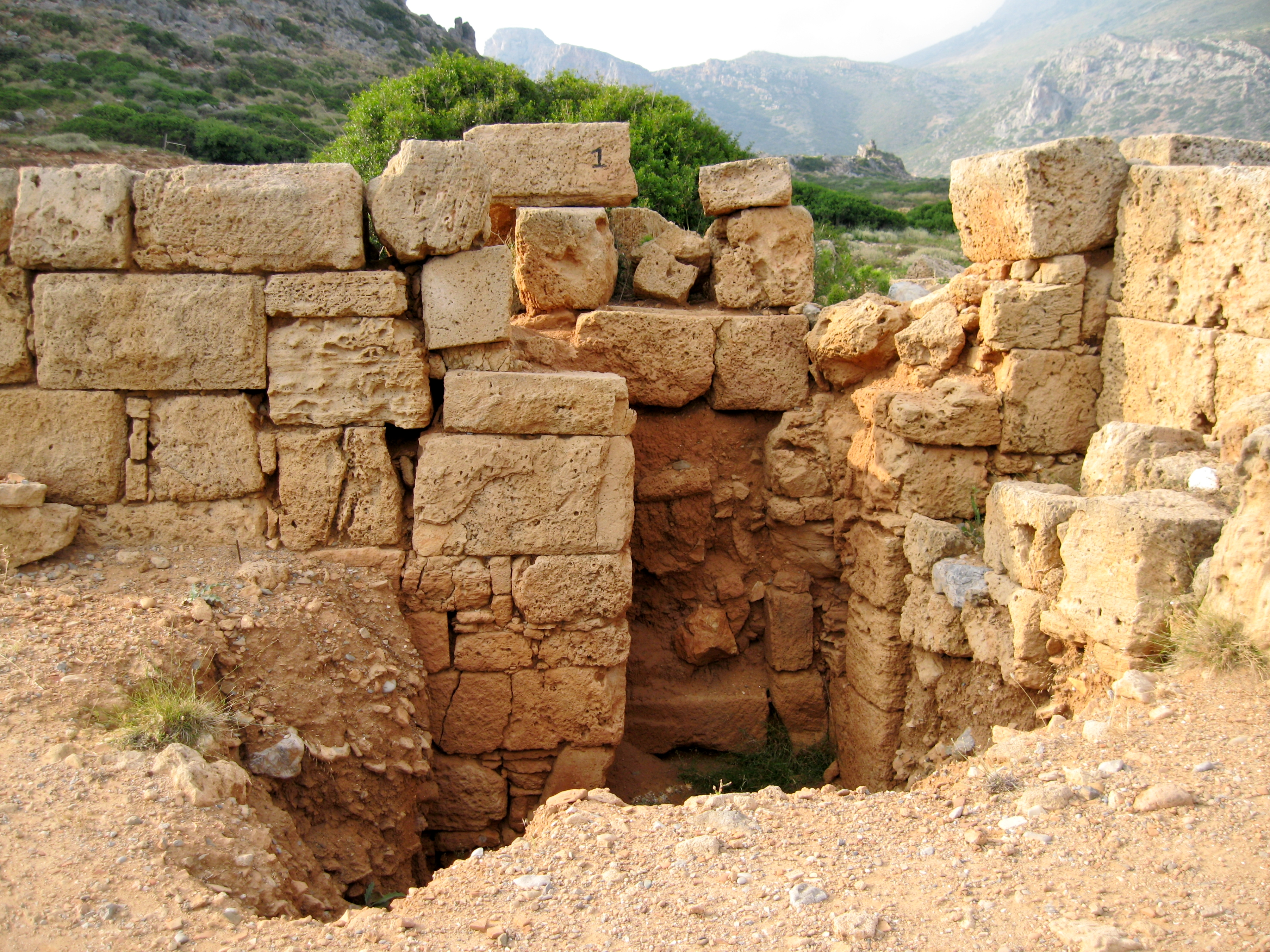 Phalasarna, Kissamos, Nomos Chania, Crete, Greece